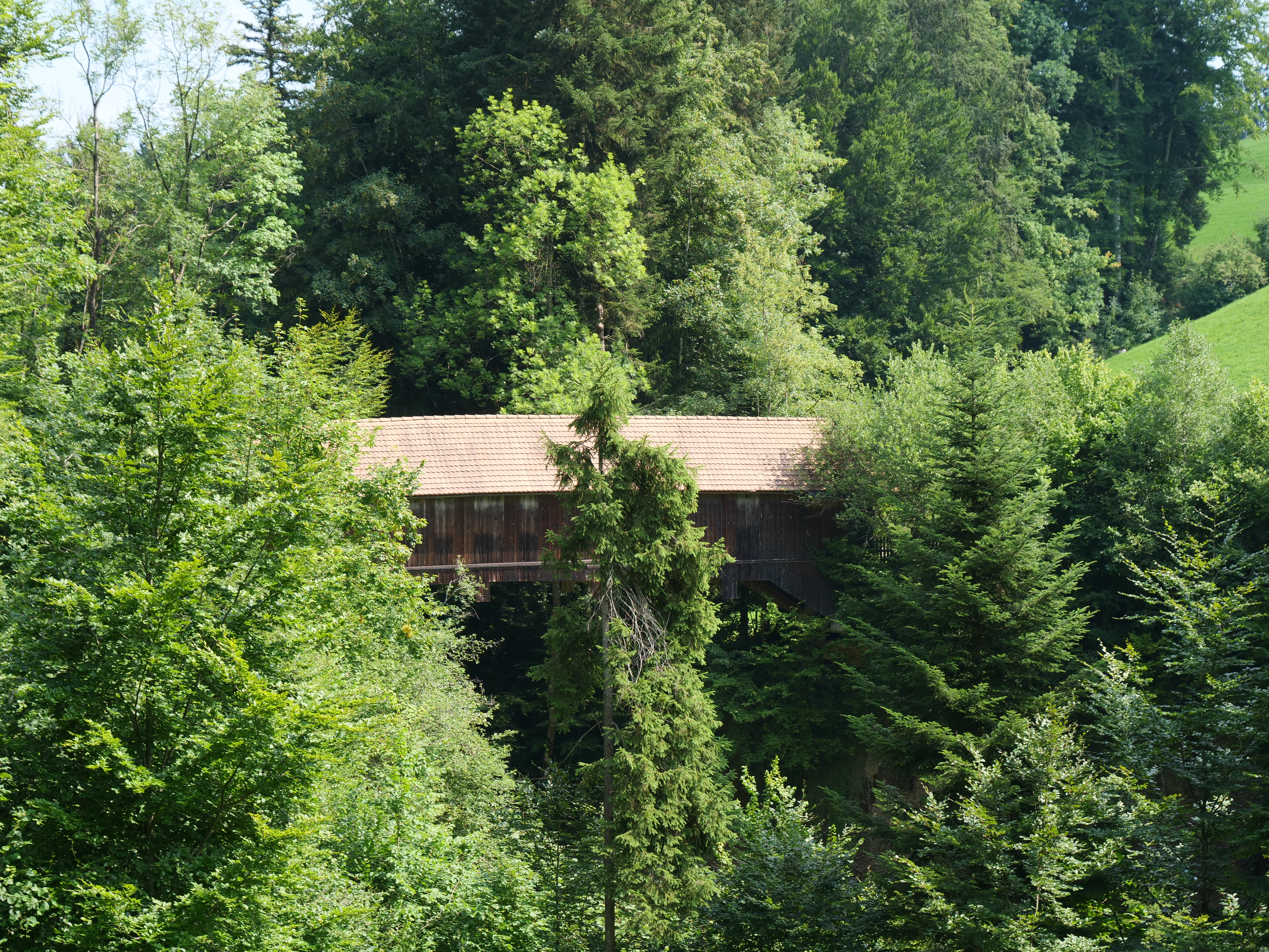 Geschlossene Südseite der Schwänbergbrücke (Wissenbach-Holzbrücke)